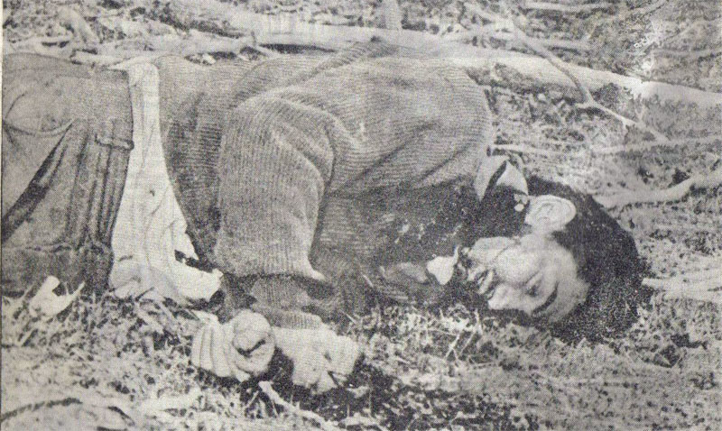 el cuerpo del Carabinero chileno Hernán Merino Correa, muerto en laguna del desierto por gendarmes argentinos.